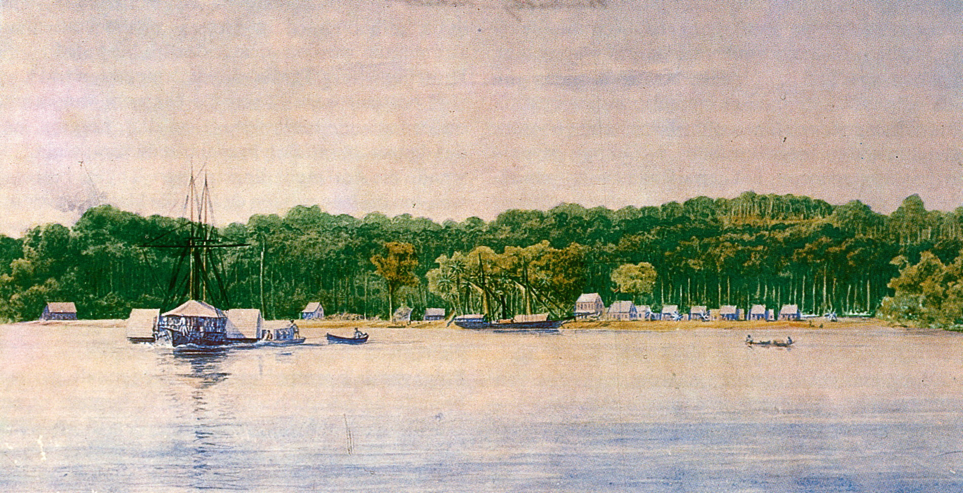 G. W. M. Voorduin; Lithografie 1860; Gemeinfrei; eigener scan